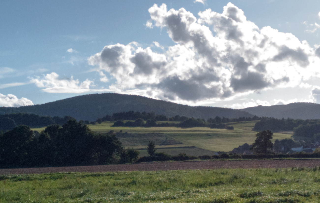 Ausschnitt mit Fokus auf den Langenberg bei Bad Harzburg.